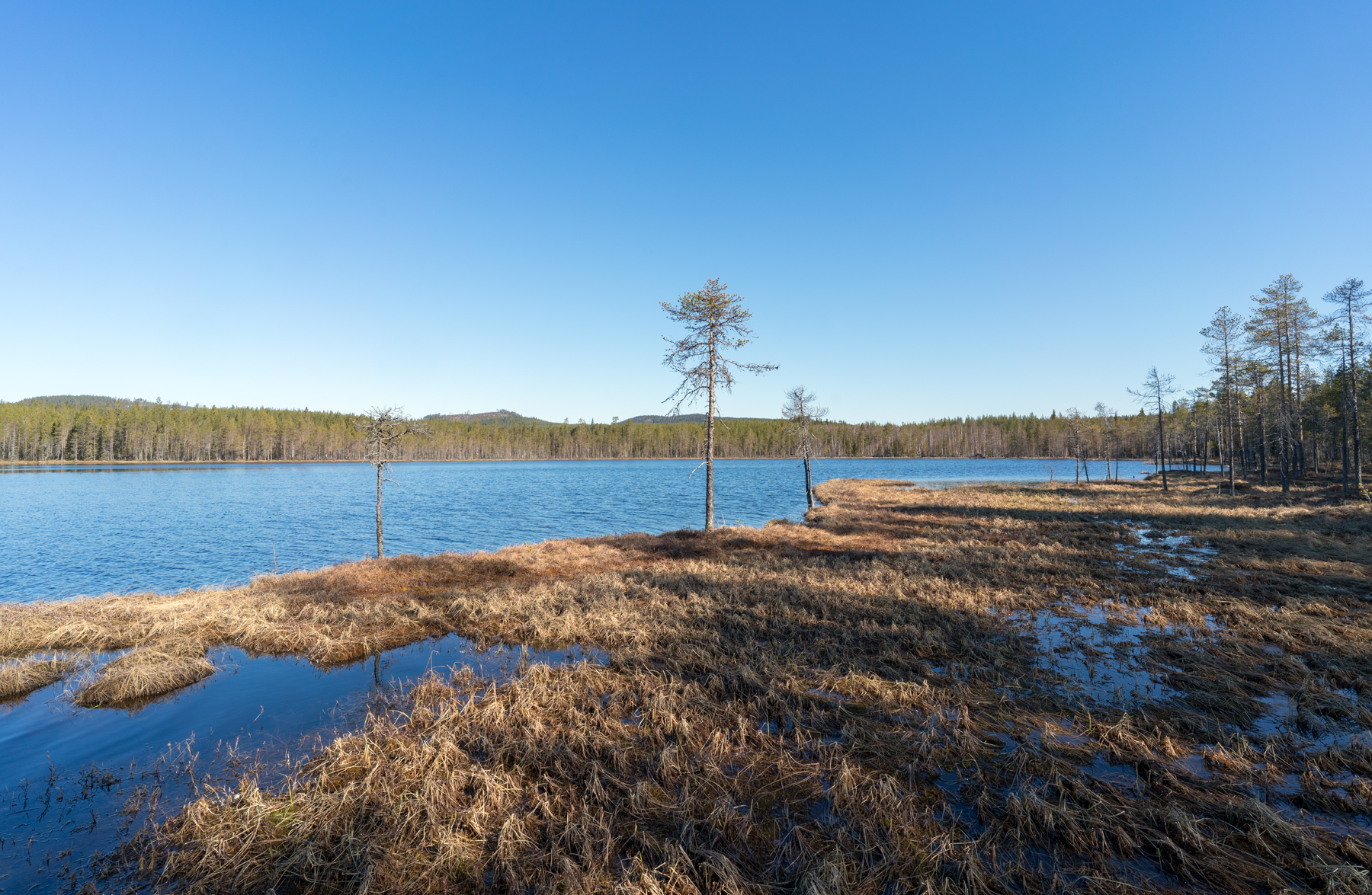 Stor-Uddersjötjärnen - vy mot norr.